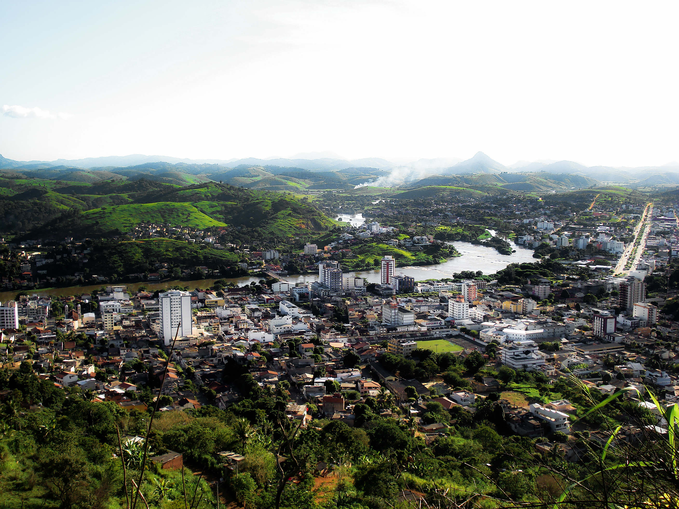 Dimensões:2816.2112 Imagem no formato:JPEG